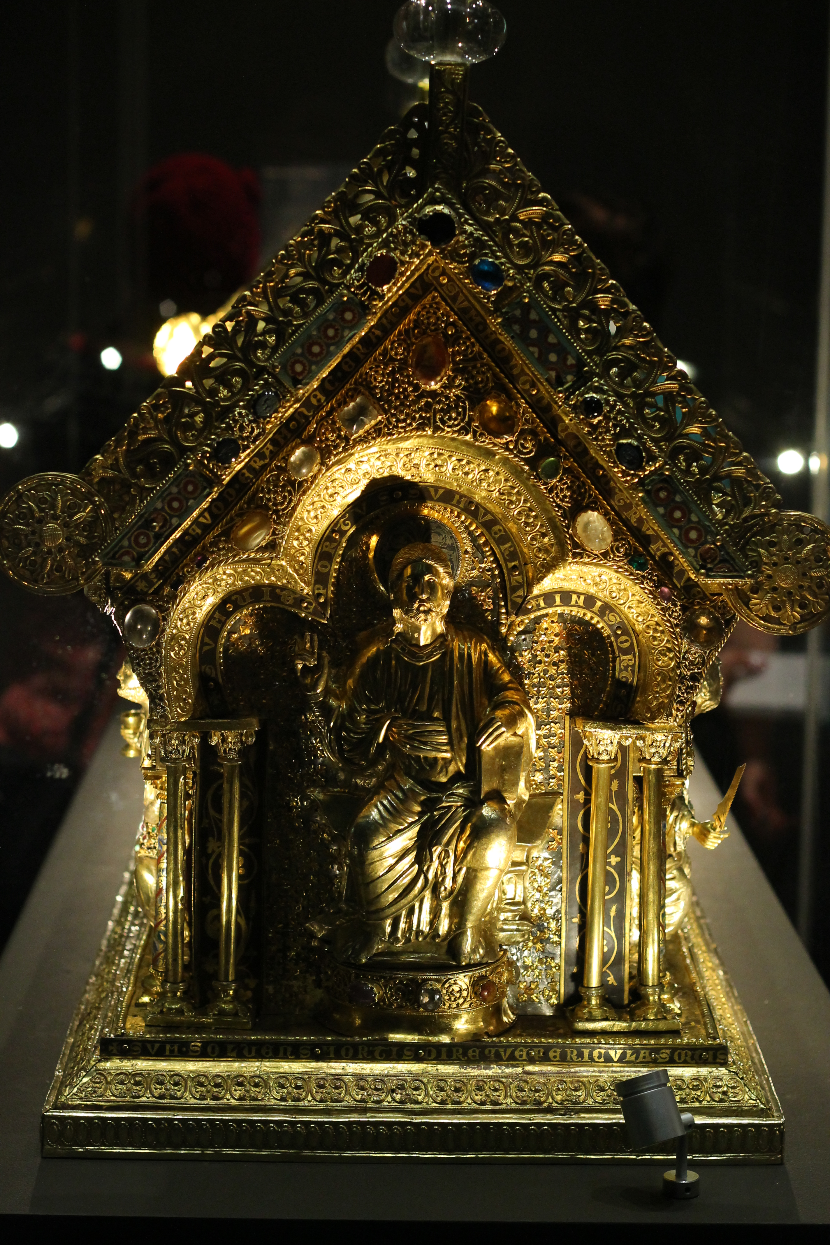 Relikviář svatého Maura, čelo s Kristem, detail Praha, Jízdárna Pražského hradu 2015